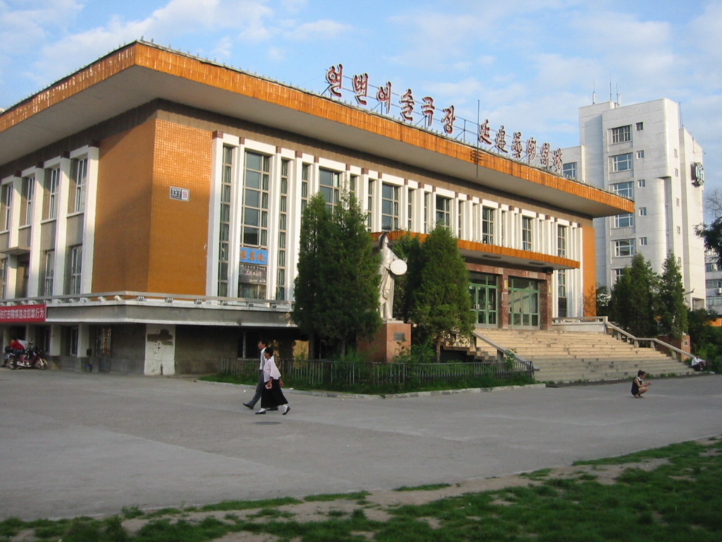 延吉芸術劇場